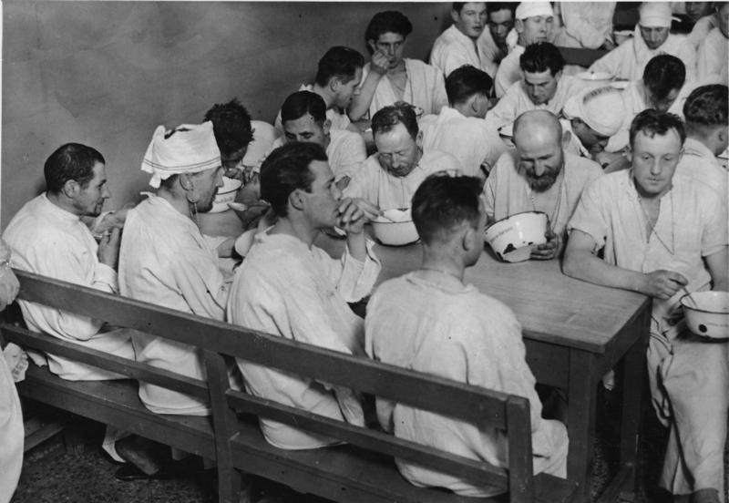 Berlin, Fröbelstraße, Speisesaal im Obdachlosenasyl ADN-ZB Berlin 1932 Speisesaal im Asyl für Obdachlose im Bezirk Prenzlauer Berg, Fröbelstr. (umbenannt in Nordmarkstr.). 39009-32